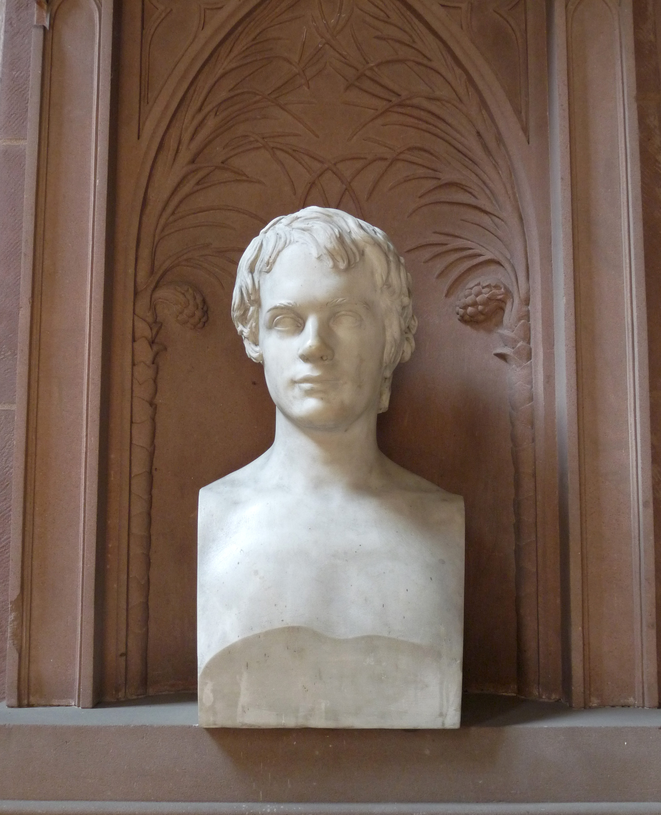 Buste du théologien Frédéric-Charles-Timothée Emmerich à l'église Saint-Thomas de Strasbourg (oeuvre de Landolin Ohmacht)